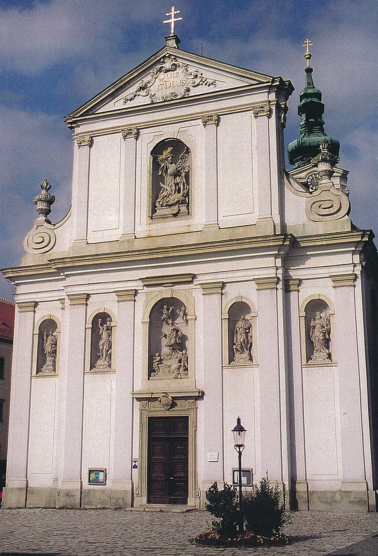 Bruck_a.d._Leitha_Kirchenfassade